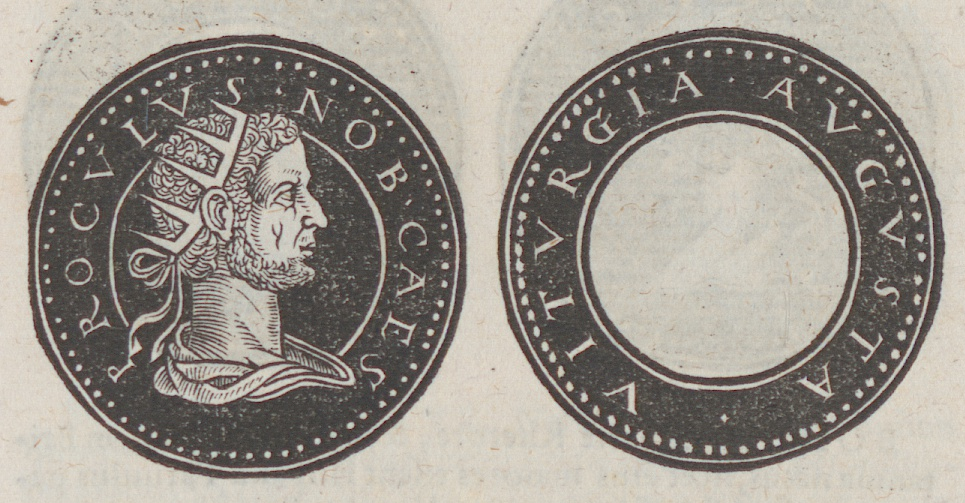 Portrait fictif de Proculus dessiné par Jacopo Strada dans la version latine de son ouvrage Epitome thesauri antiquitatum, hoc est, impp. Rom. Orientalium et Occidentalium iconum, imprimé en 1557. Livre numérisé sur E-rara